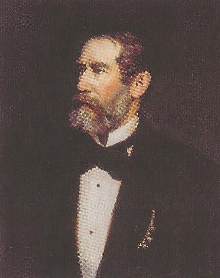 Porträt von Karl Jenny (1819–1893), Rektor der Technischen Hochschule Wien